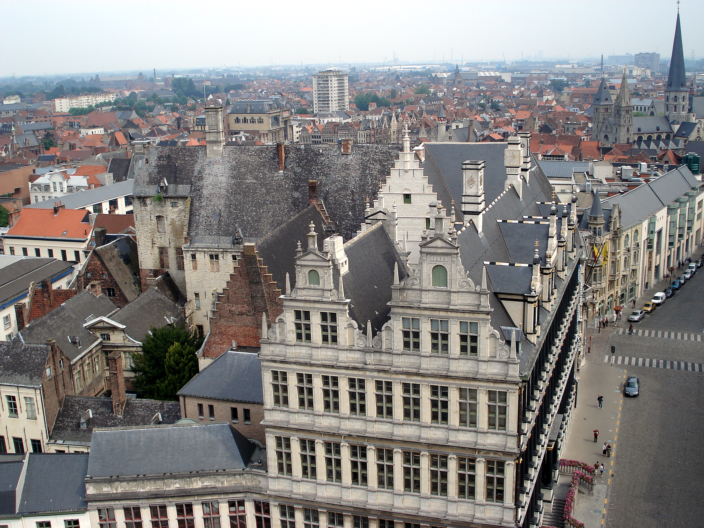 Gentse stadhuis vanuit belfort.